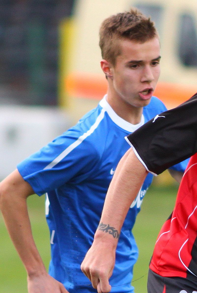 Антонио Вутов - български футболист, състезател на ПФК Левски (София). най-младият футболист играл в българската А ПФГ, дебютирал на 15 години.